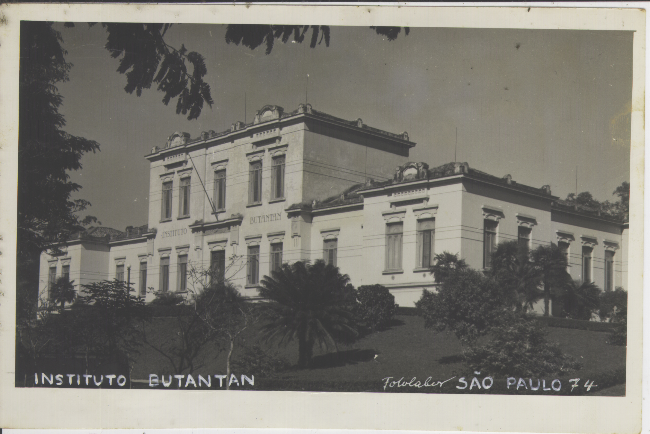 Obra que integra o acervo do Museu Paulista da USP. Coleção Werner Haberkorn